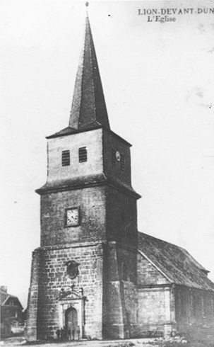 Carte postale ancienne représentant l'église de Lion